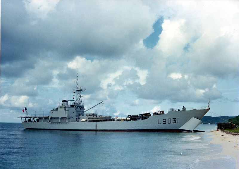 Bâtiments de Transport Léger (BATRAL) Francis Garnier